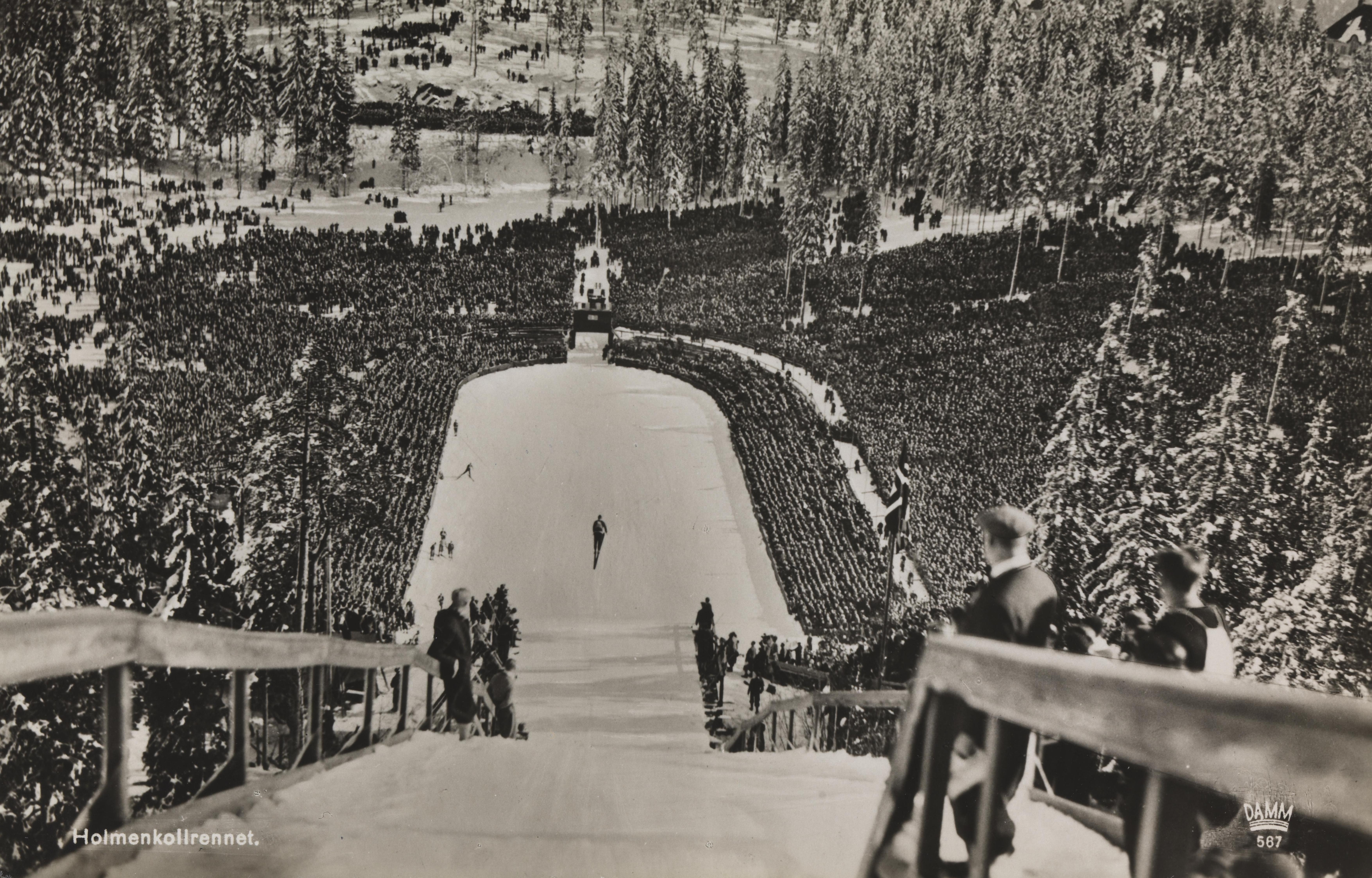 Bildet er hentet fra Nasjonalbibliotekets bildesamling Holmenkollbakken, Oslo, Oslo